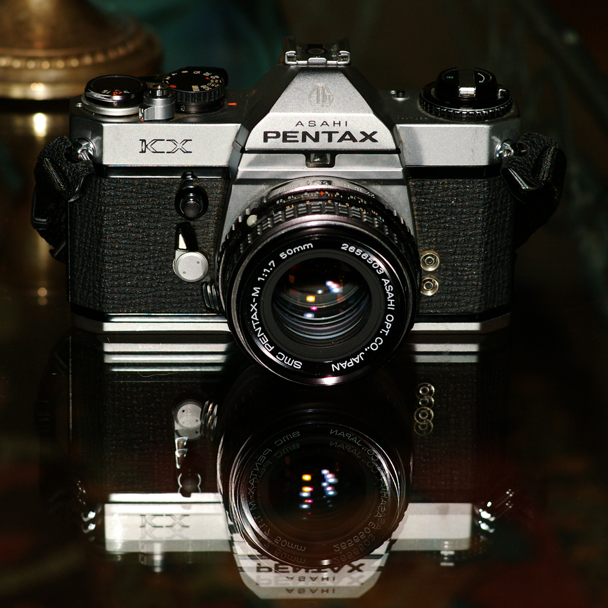 Pentax KX